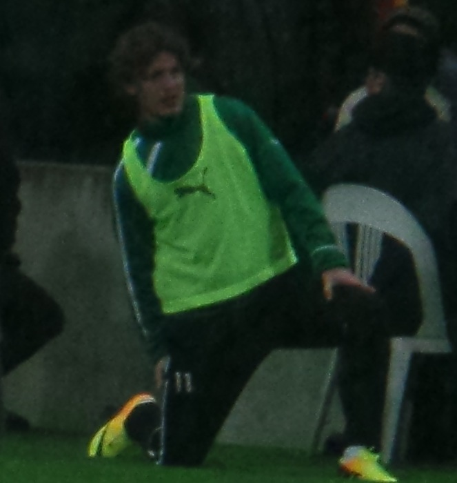 Erkan Taşkıran Akhisar ile ısınırken